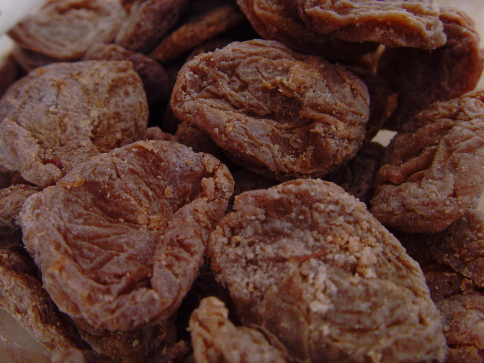 dry umeboshi